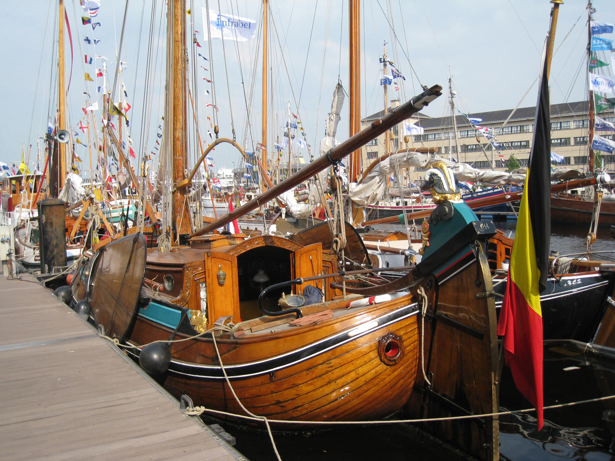 Platbodem met zijzwaard